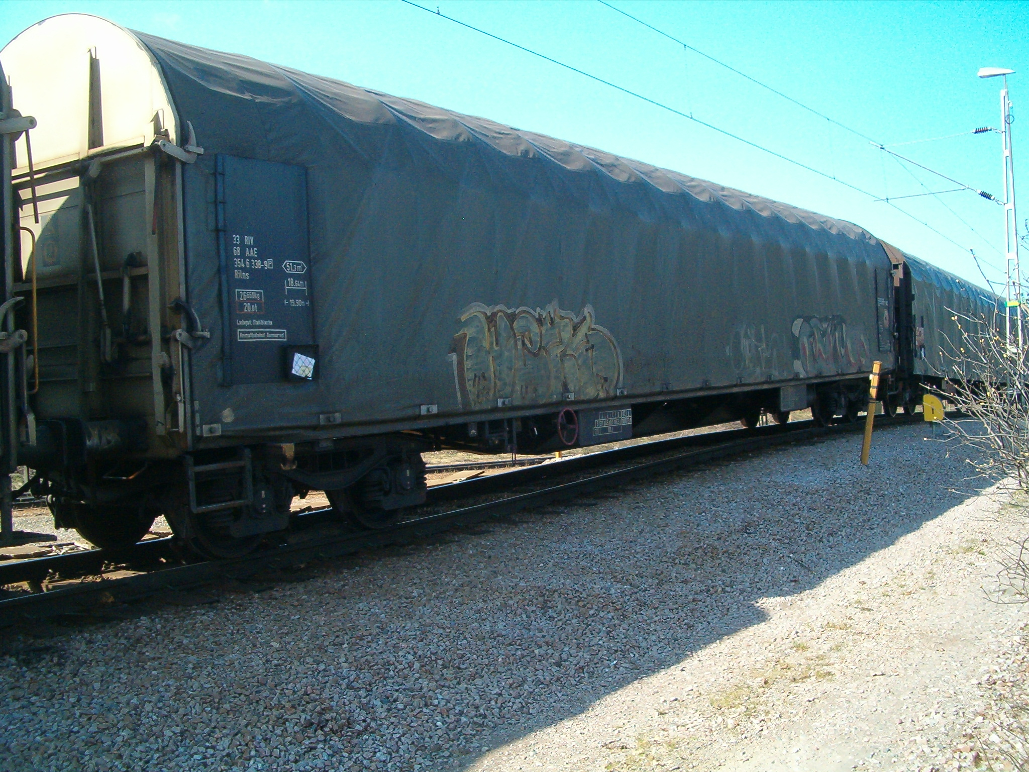 This is a picture of Rilns 33 68 354 6338-9. The waggon is owned by AAE and it's used to transport steelcoils. Detta är en bild på Rilns 33 68 354 6338-9. Vagnen som ägs av AAE andvänds för att transportera stålcoils.